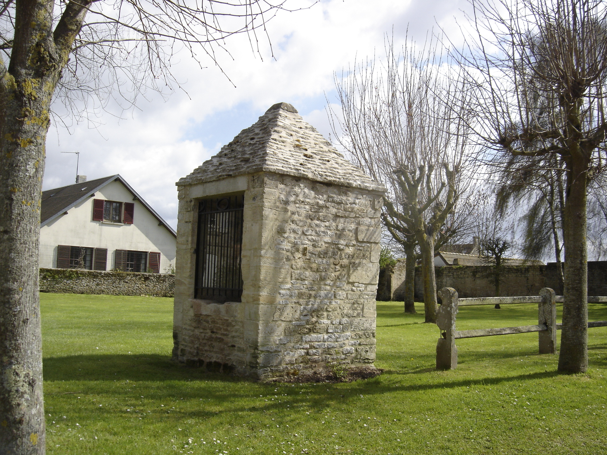 puits couvert à Banville